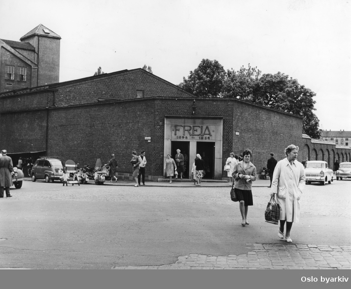 Arbeidstakere på vei fra jobb på Freia, Seilduksgata sett fra sørøst, hjørnet ved Verksgata